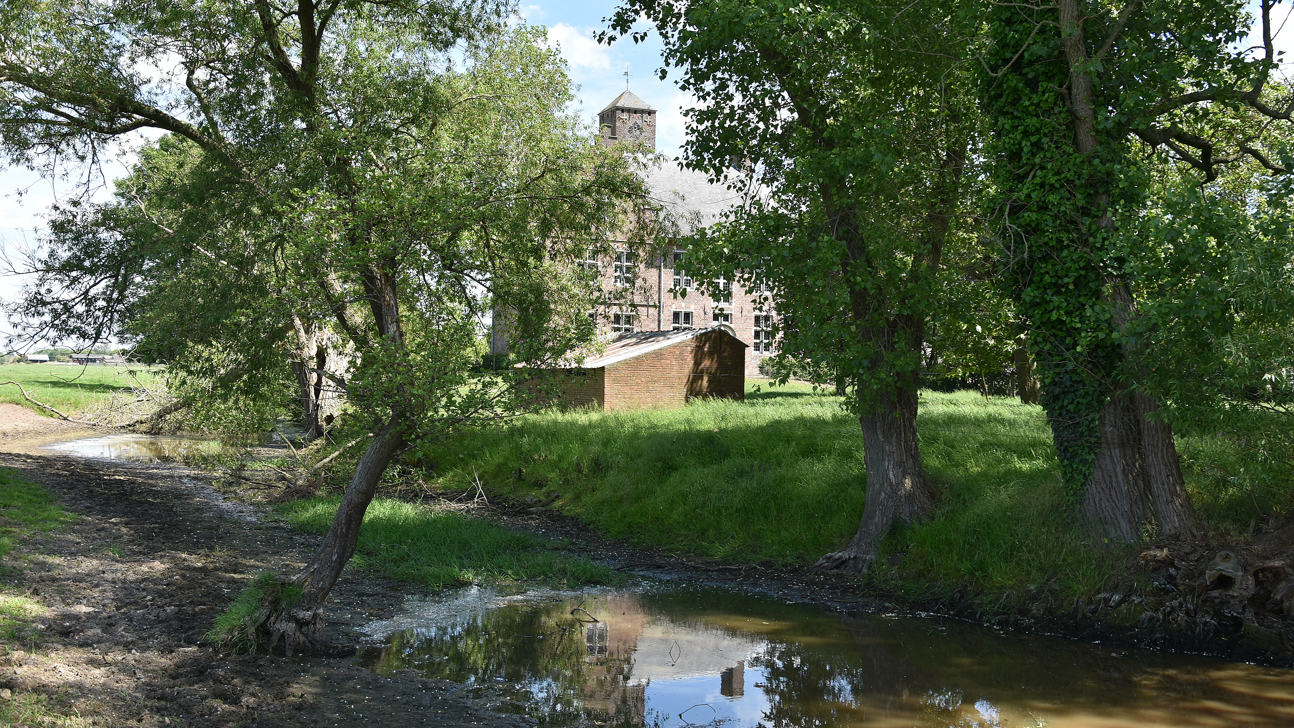 Hof ter Cruysse (44745) Kaprijke 2-06-2019 14-51-37